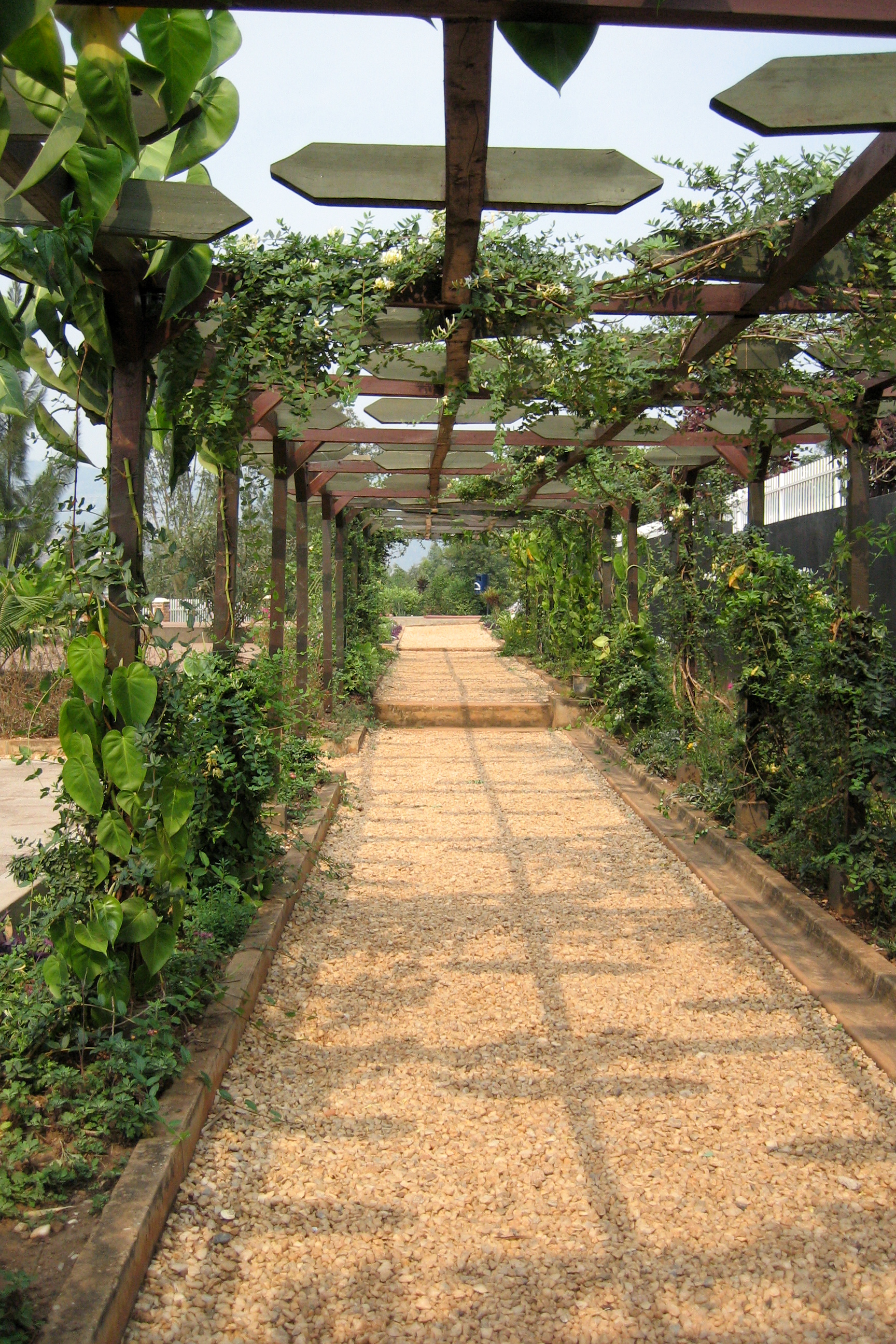 Kigali Memorial Centre, Gisozi